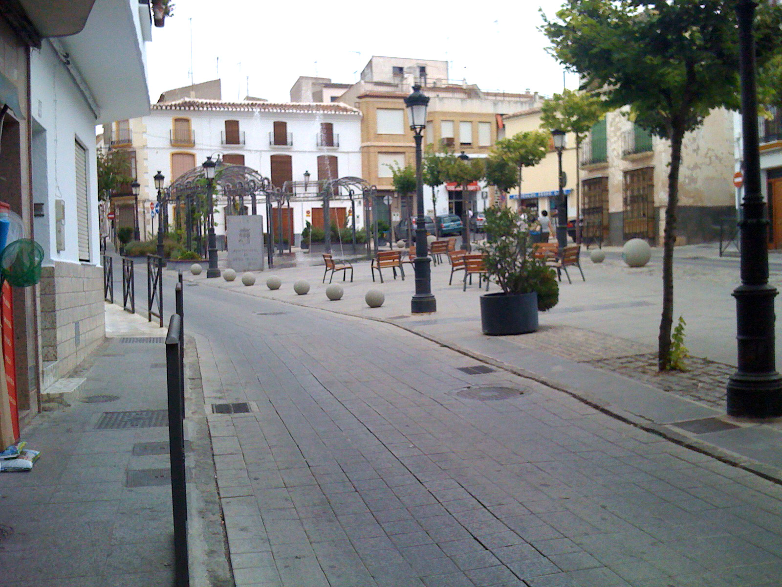 La Place de la Feria, à Velez Rubio